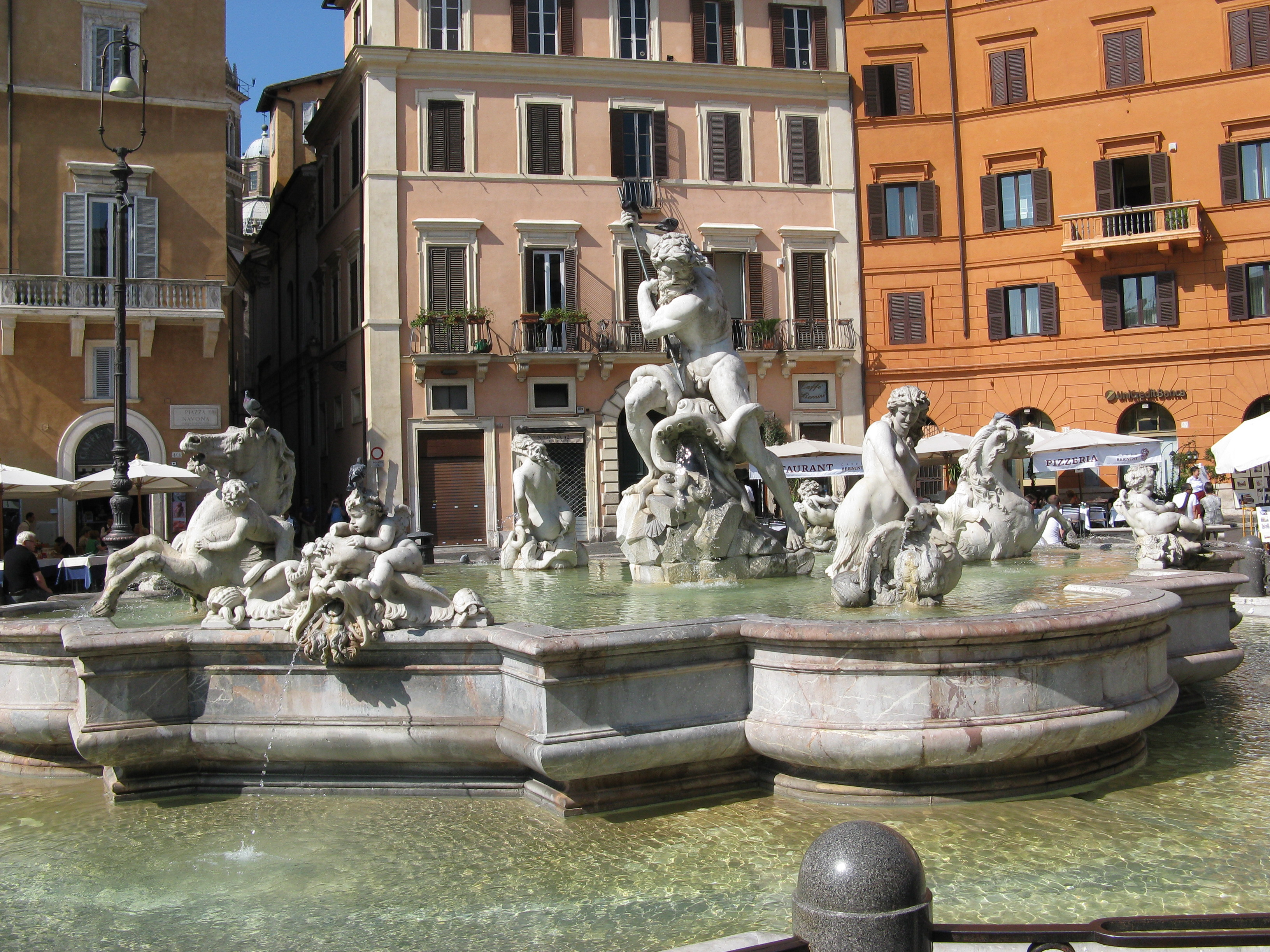 Fontana del Nettuno at Piazza Navona.